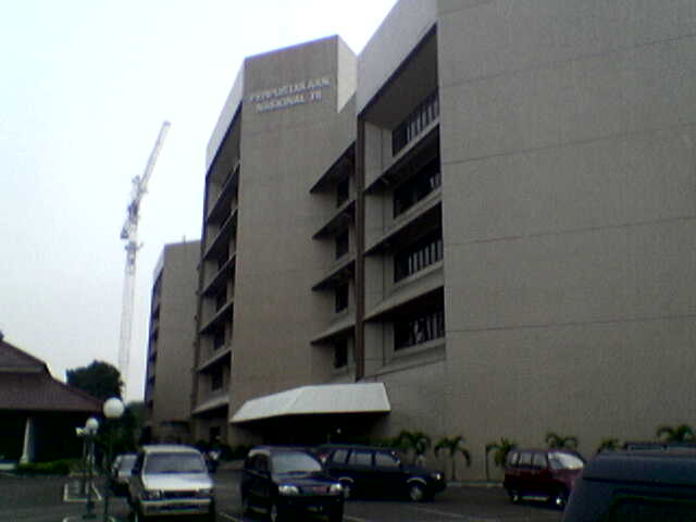 Dibuat oleh Meursault2004 pada 11 Juli 2005